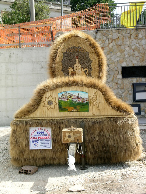 Fragneto Monforte (BN): un carro di grano della Festa dei Carri di San Marco dei Cavoti, esposto all'annuale Raduno Internazionale di Mongolfiere.